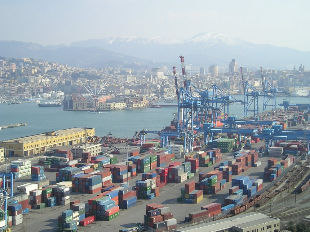 Il porto commerciale di Genova ed il porto antico fotografati dalla cima della Lanterna